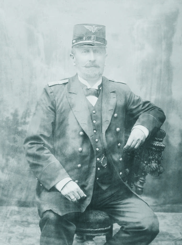 Bernhard Kollmann, Gründer u. Eigentümer der Grazer Pferdetramway Diese Aufnahme wurde auf dem Dachboden der Villa Kollmann gefunden und stellt den Gründer u. Eigentümer der Grazer Pferdetramway dar.